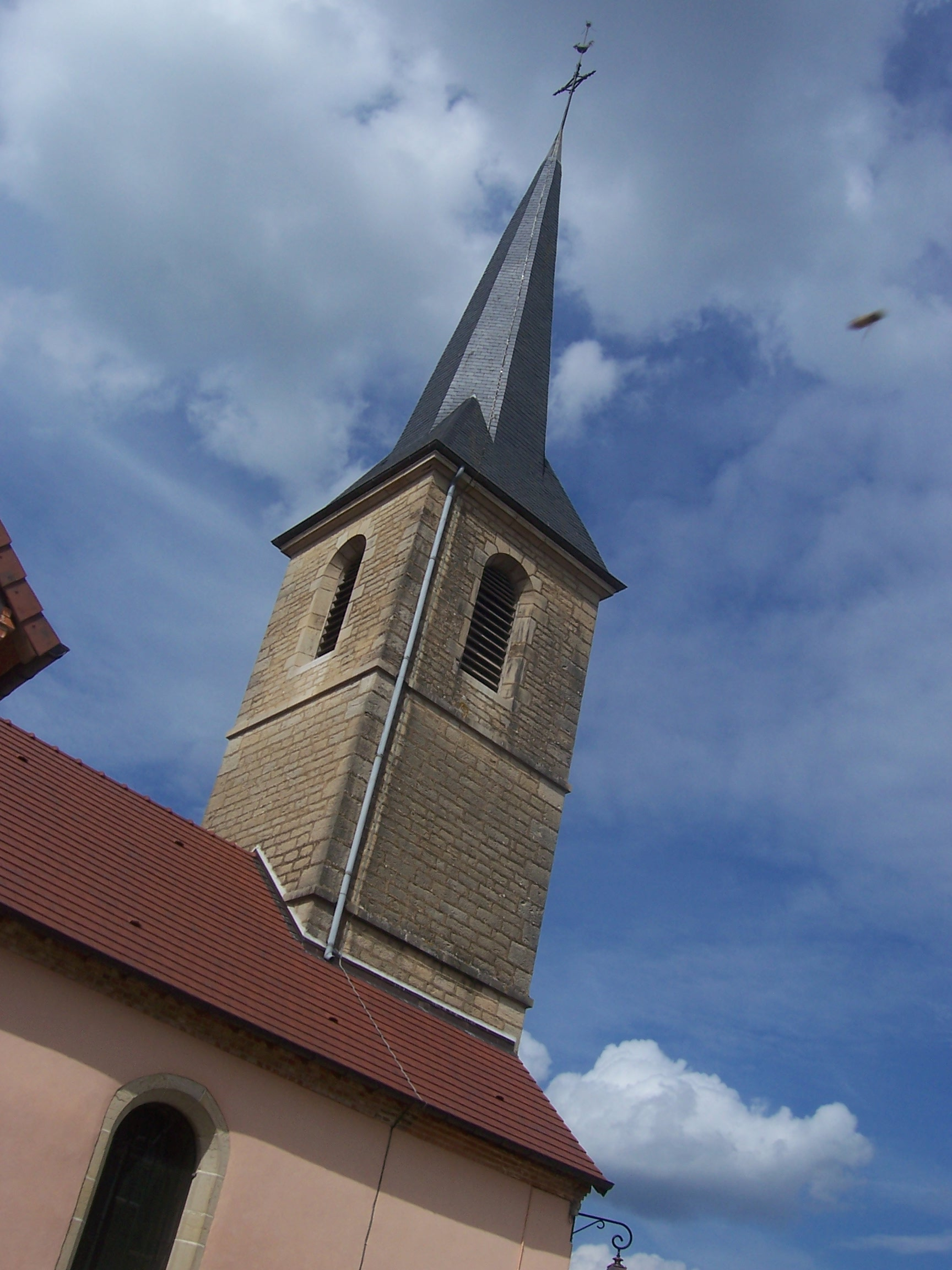 Eglise de Bosjean